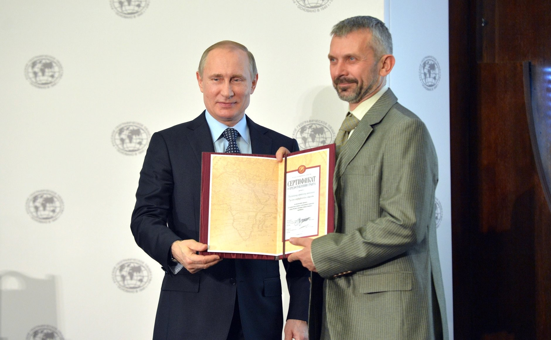 Заседание попечительского совета Русского географического общества. Владимир Путин вручил сертификат на получение гранта на реализацию проекта создания базы данных пещер России учёному секретарю отделения Русского географического общества в Республике Крым Геннадию Самохину